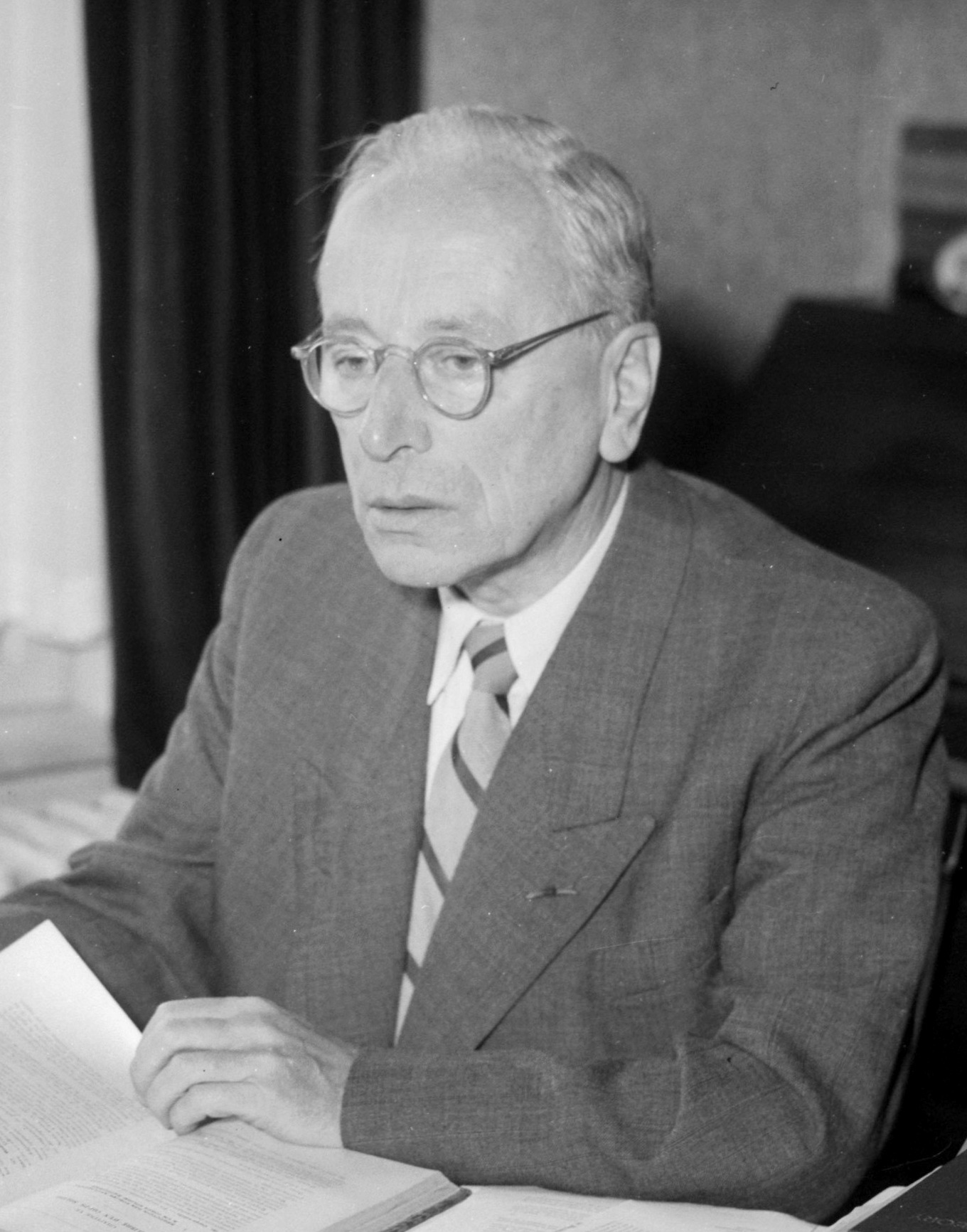 Frits Zernike